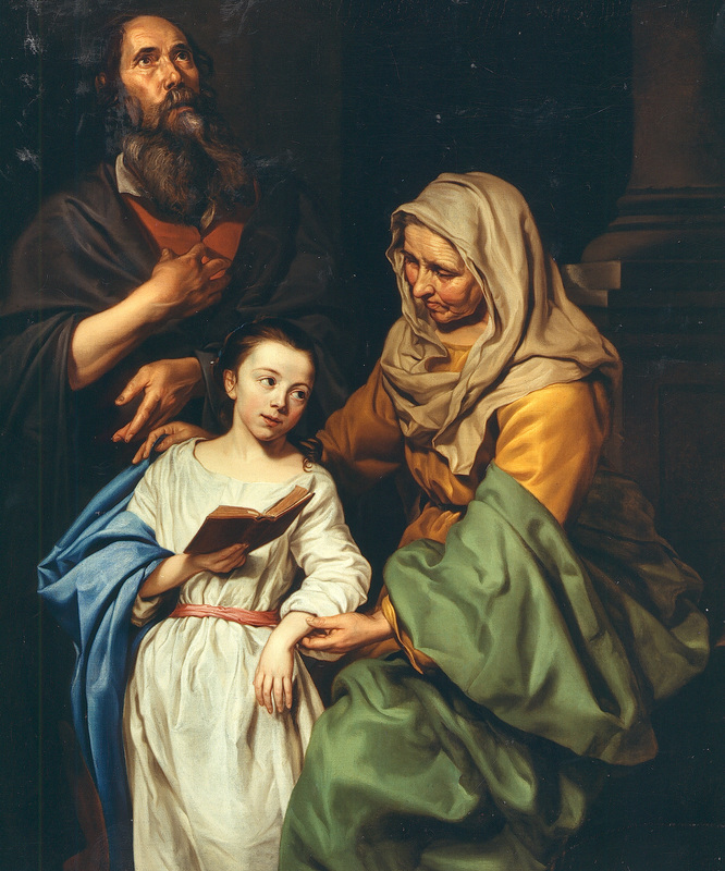 La educación de la Virgen, óleo sobre lienzo, 145 x 124 cm, La Haya, galería Hoogsteder. Firmado: MICHAELINA WAUTIER INVENIT ET FECIT 1656